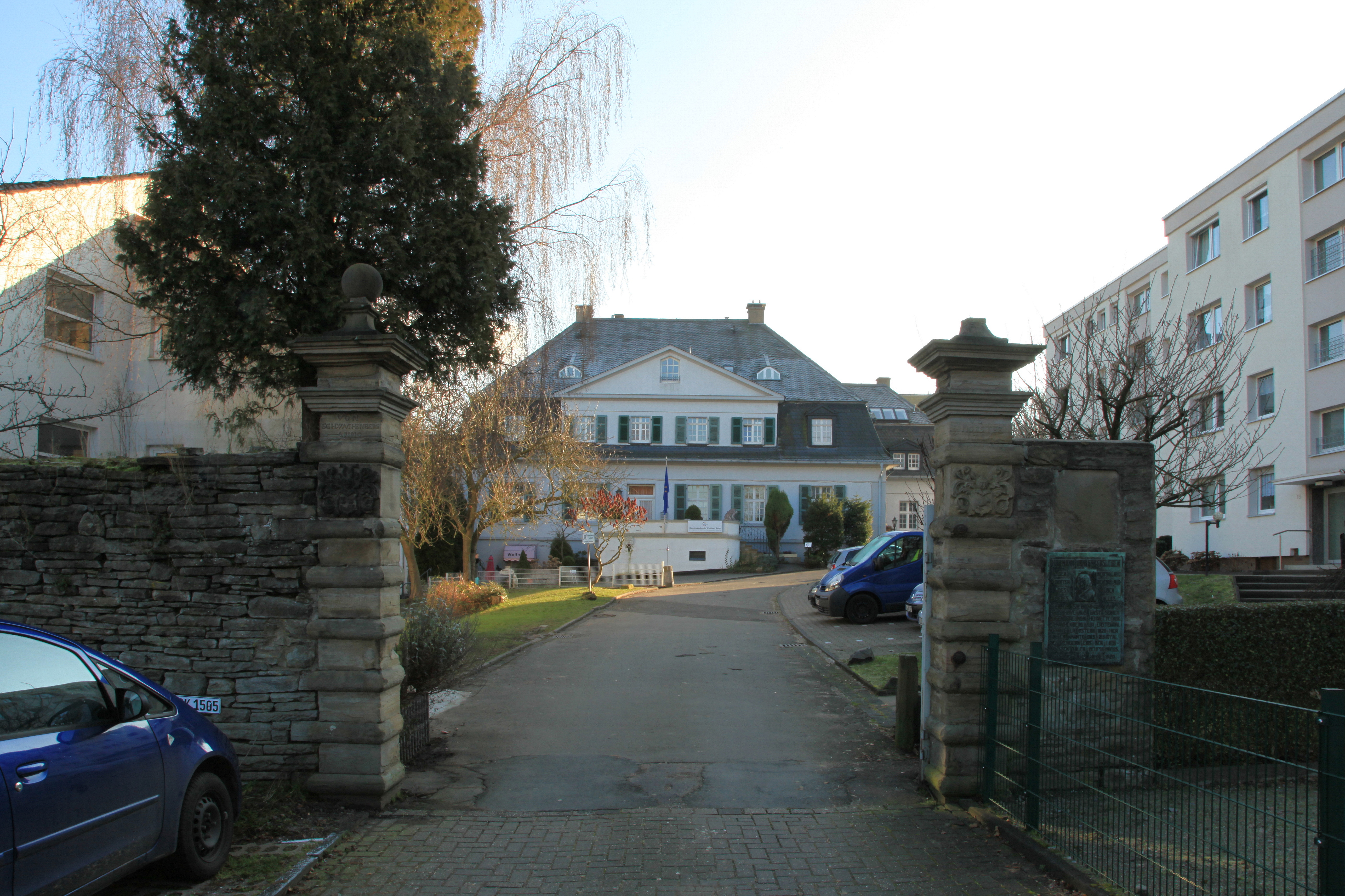 Kunstakademie Wetter (Ruhr) im Haus Hove, Haus Hove 9 in Wetter (Ruhr)